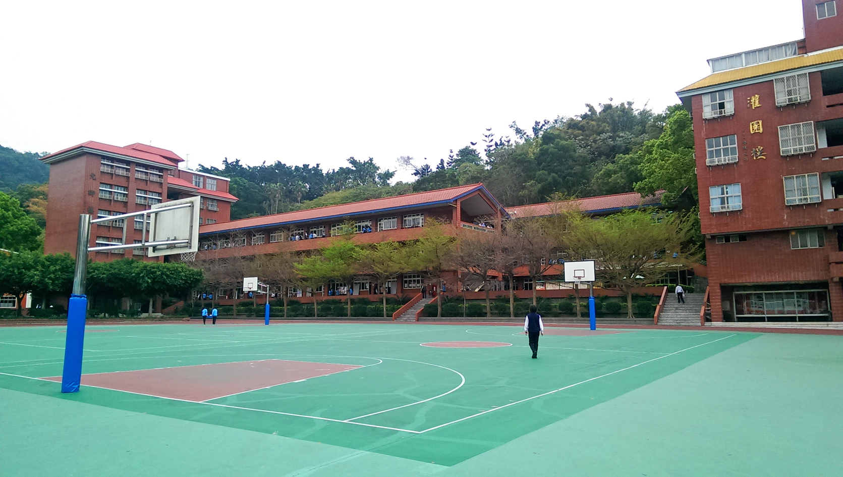 中文（台灣）: 明台中學校園